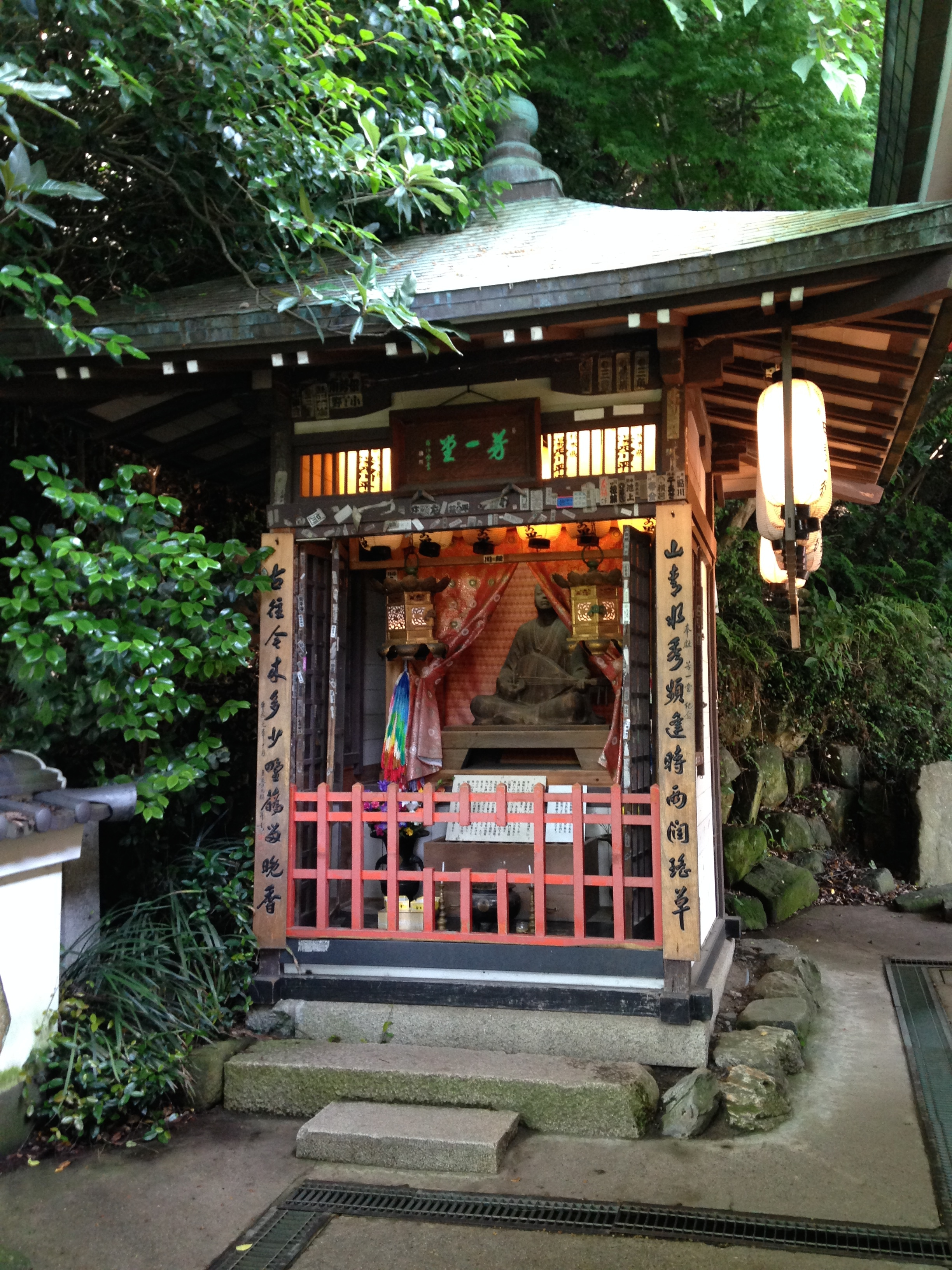 赤間神宮境内・芳一堂